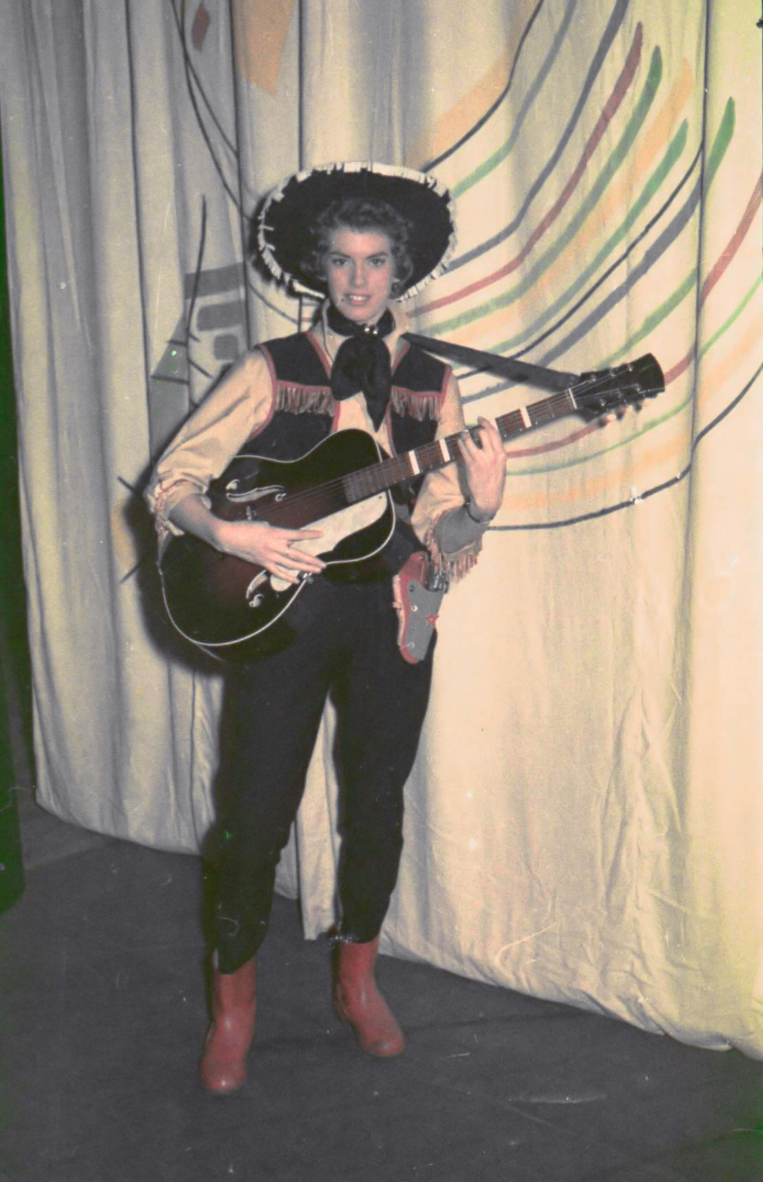 Ria Valk bij de eerste revu van Tamboer- en trompetterkorps Ahoy Rotterdam